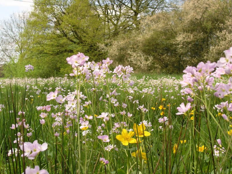 Wiesenschaumkraut (Cardamine pratensis) und Sumpfdotterblume (Caltha palustris)